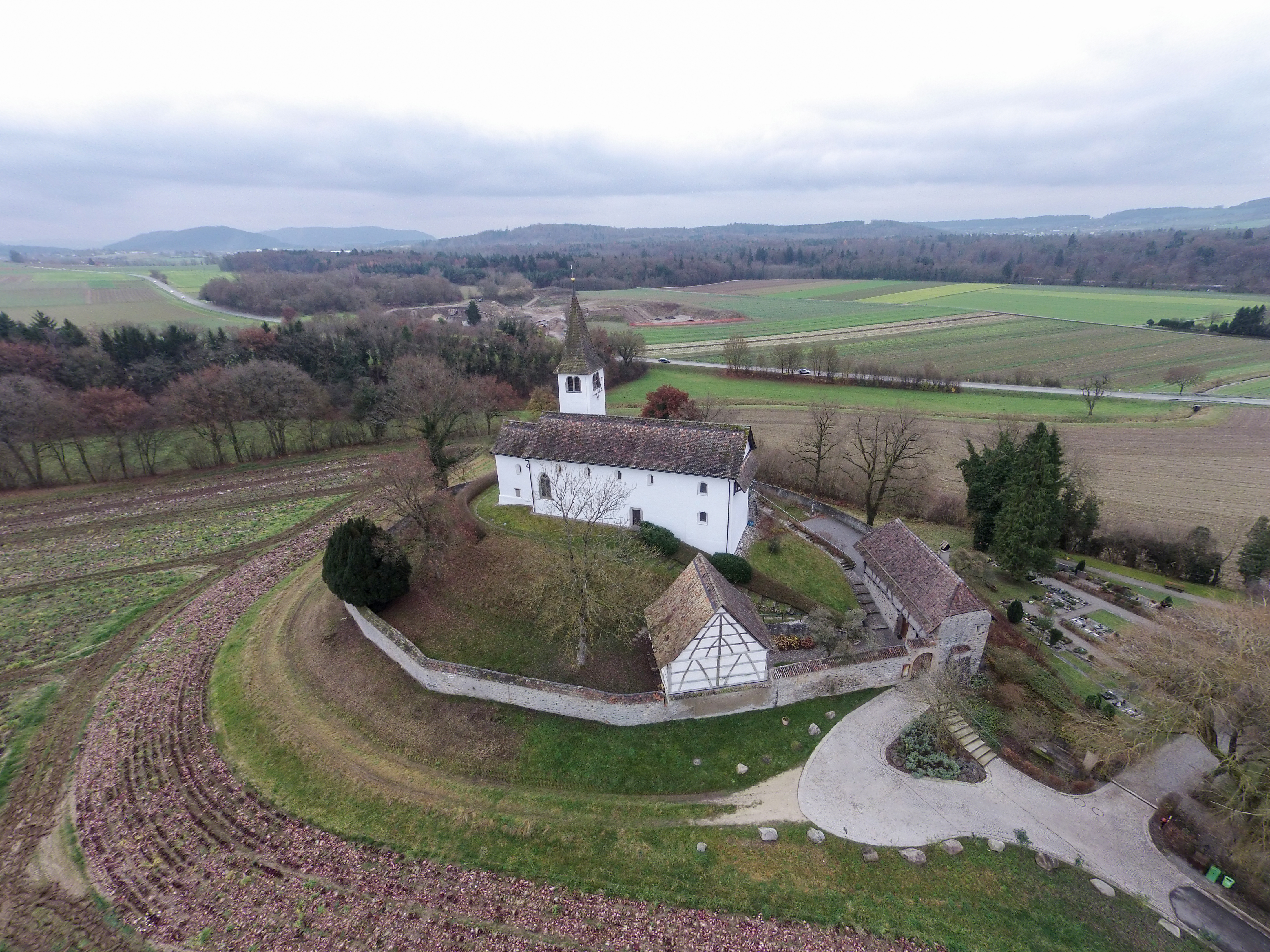 Germany, Baden-Württemberg, Bergkirche St. Michael in Büsingen am Hochrhein